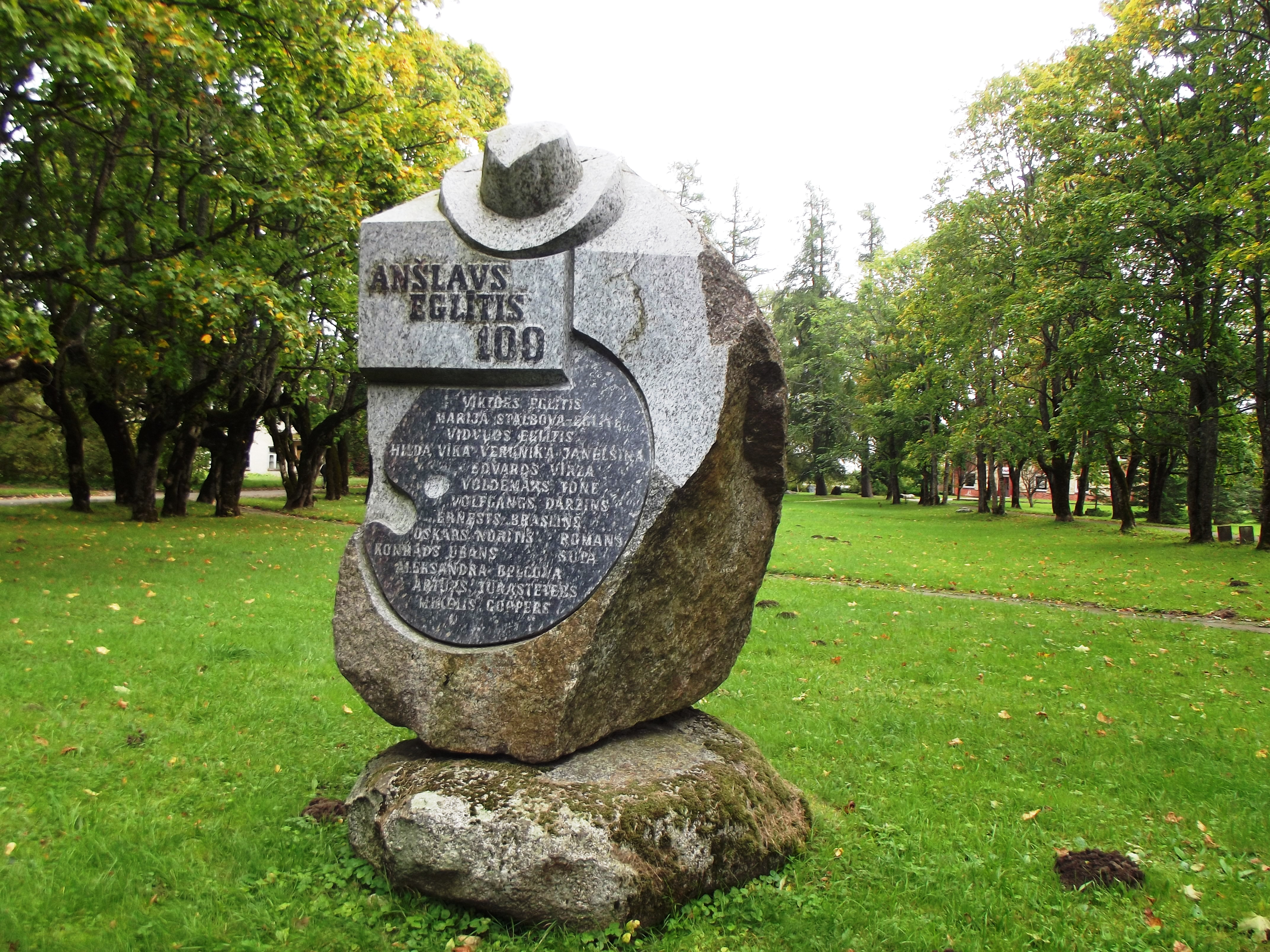 Inciems